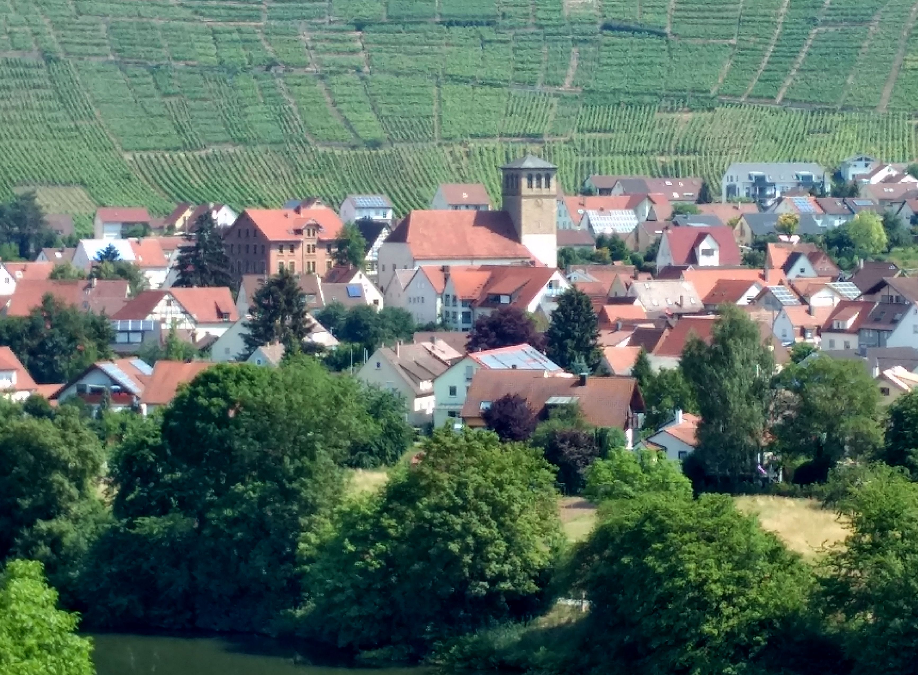 Mundelsheim: Nikolauskirche, links daneben Altes Schulhaus gesehen vom Schreyerhof aus (Südwesten).